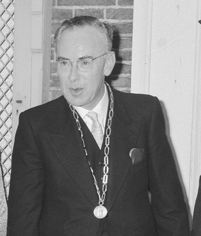 Collectie / Archief : Fotocollectie Anefo Reportage / Serie : [ onbekend ] Beschrijving : Nijkerk 550 jaar . Burgemester en Kardinaal Alfrink Datum : 26 maart 1963 Locatie : Nijkerk Persoonsnaam : Alfrink, Bernardus Fotograaf : Nijs, Jac. de / Anefo Auteursrechthebbende : Nationaal Archief Materiaalsoort : Negatief (zwart/wit) Nummer archiefinventaris : bekijk toegang 2.24.01.03 Bestanddeelnummer : 914-9728